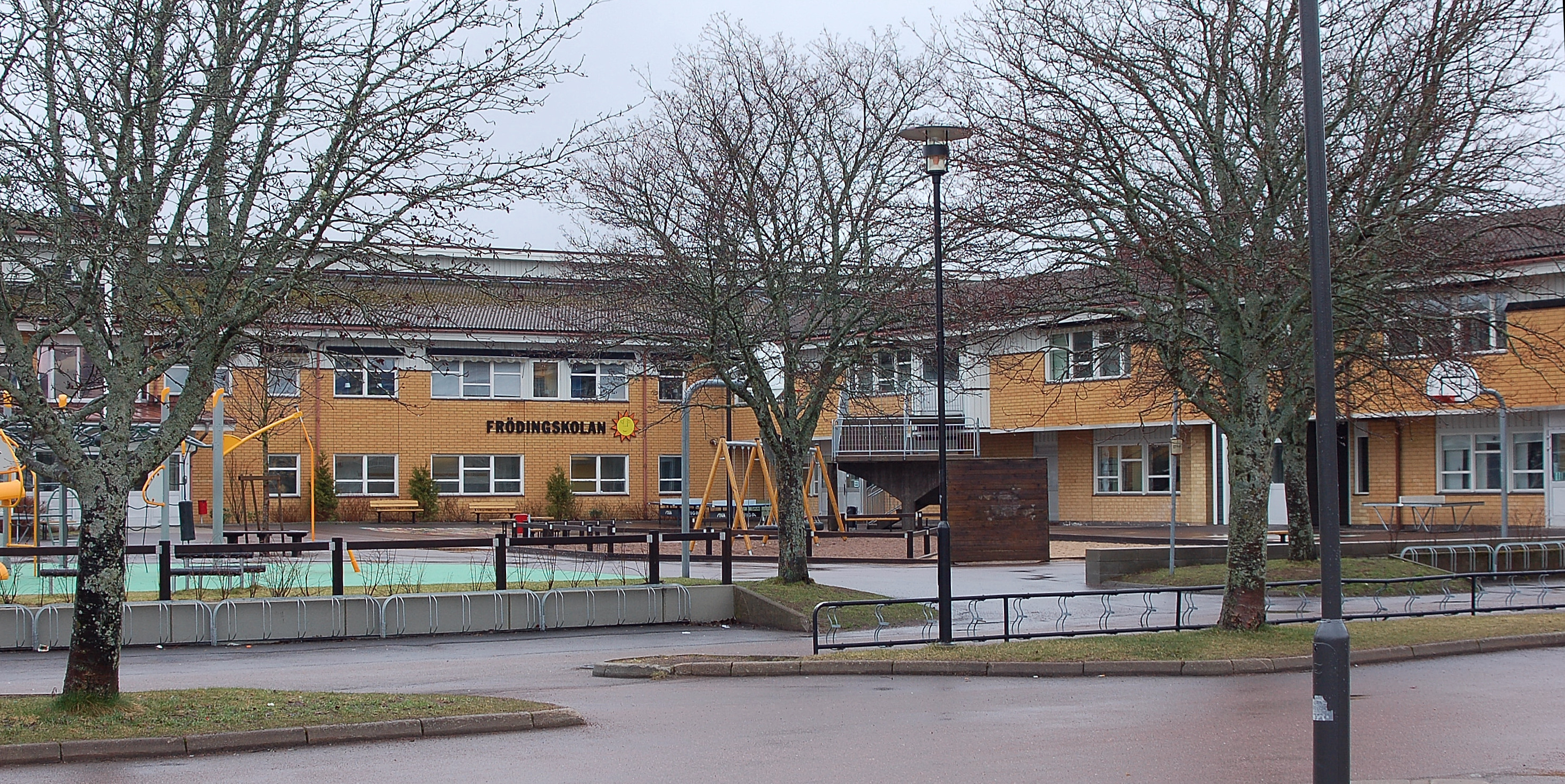 Frödingskolan Kronoparken, Karlstad